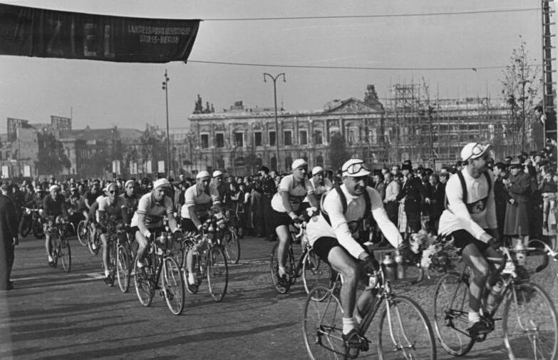 Friedensfahrt, Berlin, Start Illus Martin 3.10.51 "Friedensfahrt der Nationen" gestartet Die Radrundfahrt durch die DDR, "Friedensfahrt der Nationen", begann am 3.10.51 am Start und Ziel auf dem Marx-Engels-Platz in Berlin. An der Rundfahrt nahmen namhafte internationale Radrennfahrer teil. UBz: Die große Fahrt beginnt. Leihweise Illus Berlin WS